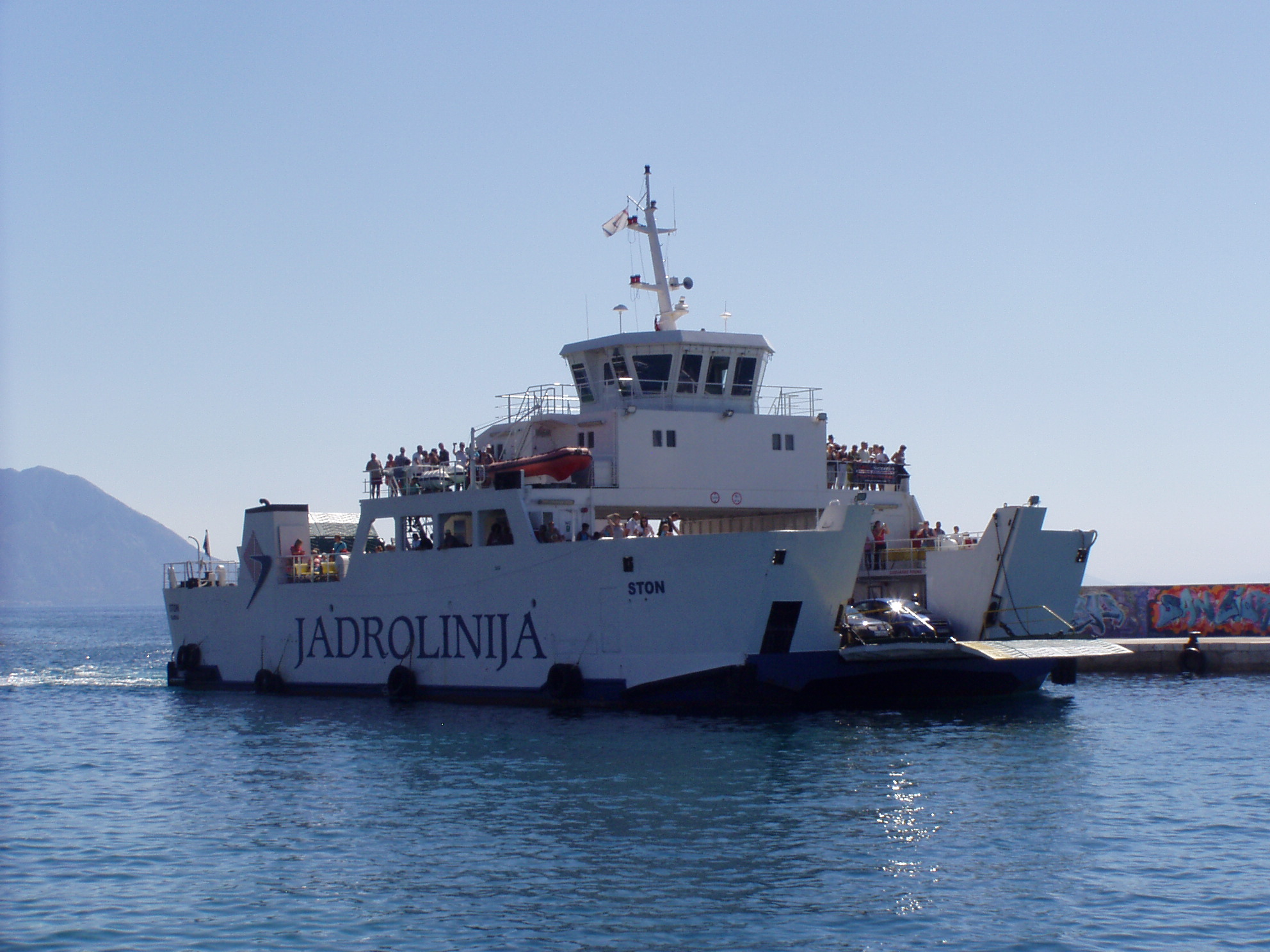 Ston - trajekt